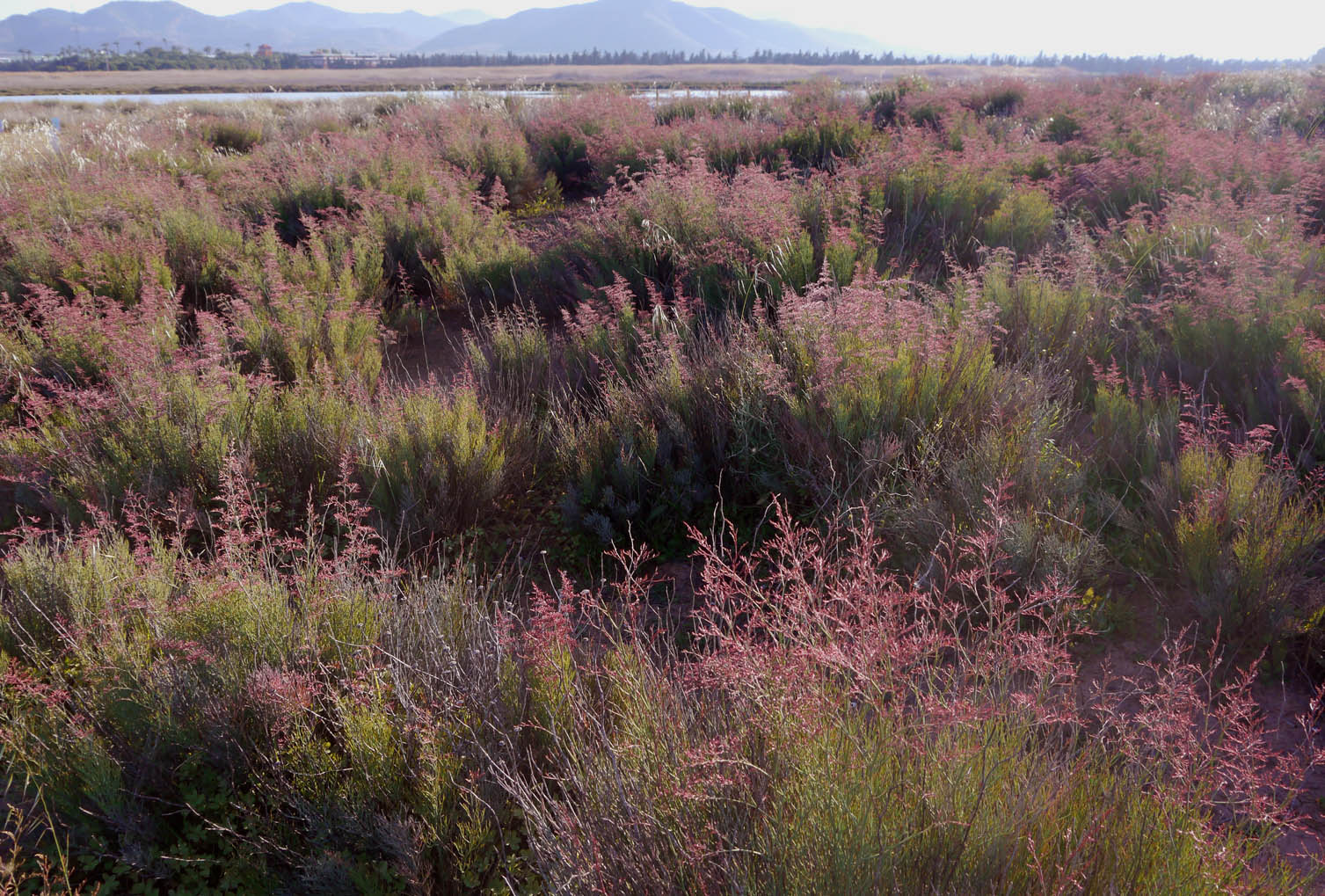 Saladar de Lo Poyo, espacio protegido en el entorno del Mar Menor, Cartagena, España. En primer plano ejemplares de Limonium caesium.